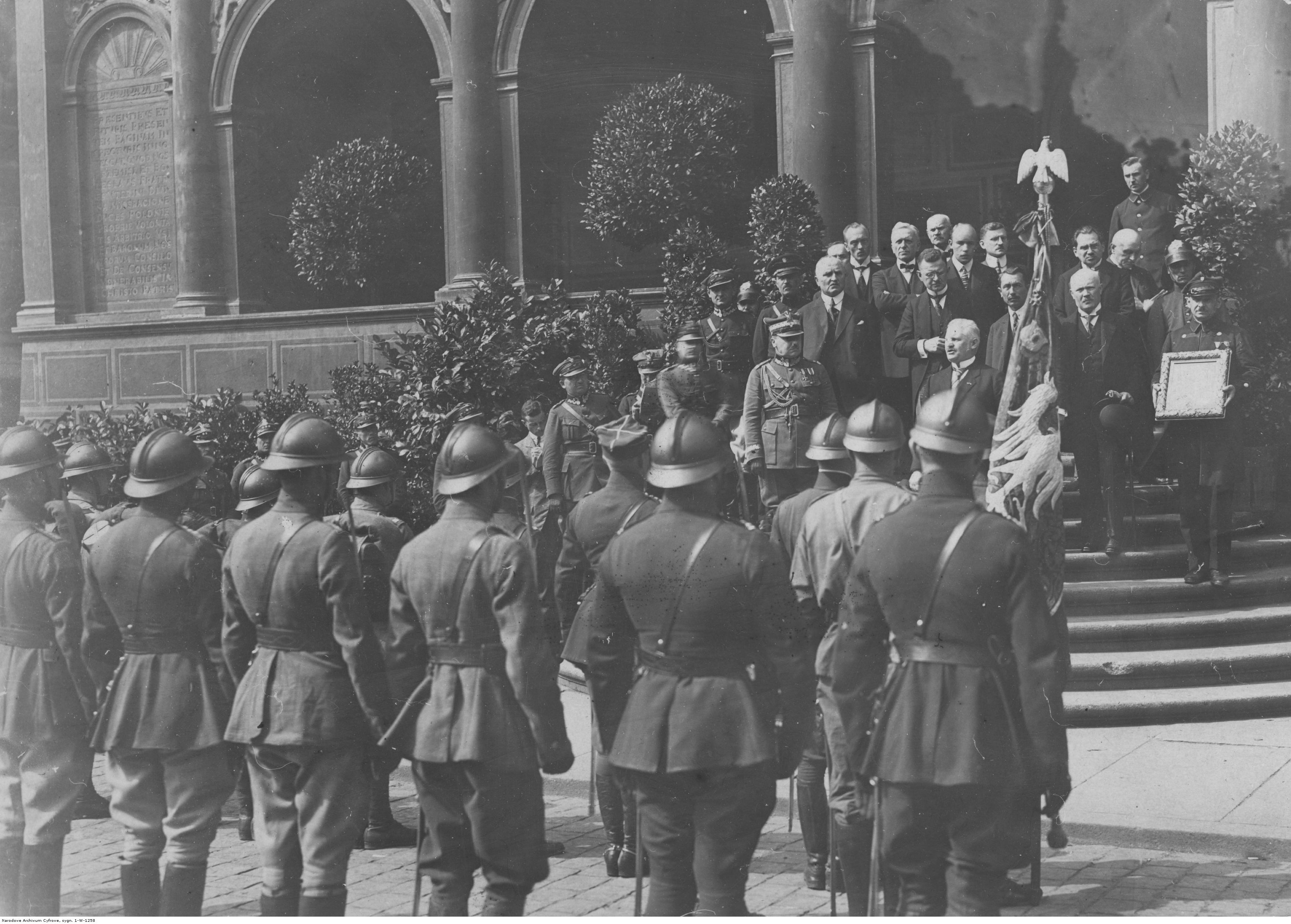 Wręczenie odznaki 55 pułku piechoty miastu Poznań; 1924. Prezydent Poznania Cyryl Ratajski (na lewo od sztandaru) przemawia po wręczeniu miastu odznaki 55 pułku piechoty. Koncern Ilustrowany Kurier Codzienny - Archiwum Ilustracji. Sygnatura: 1-W-1258